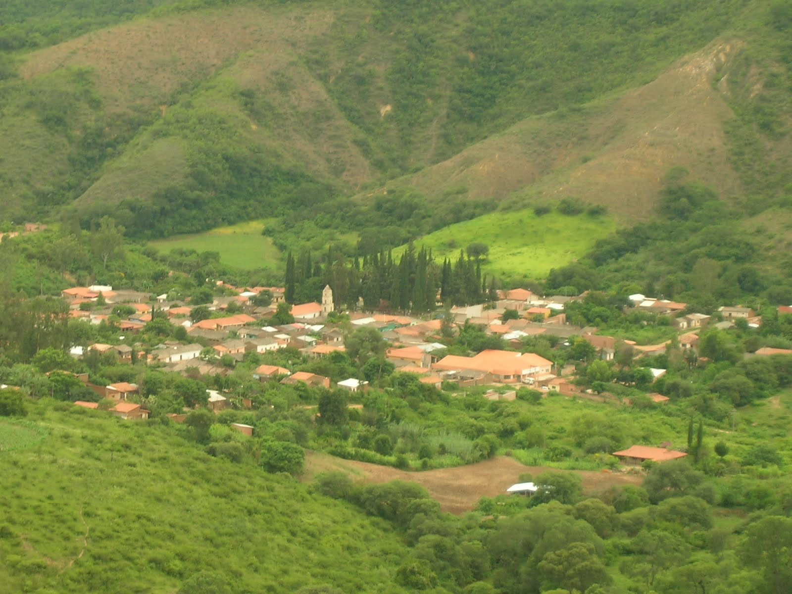 Vista del pueblo de Quirusillas